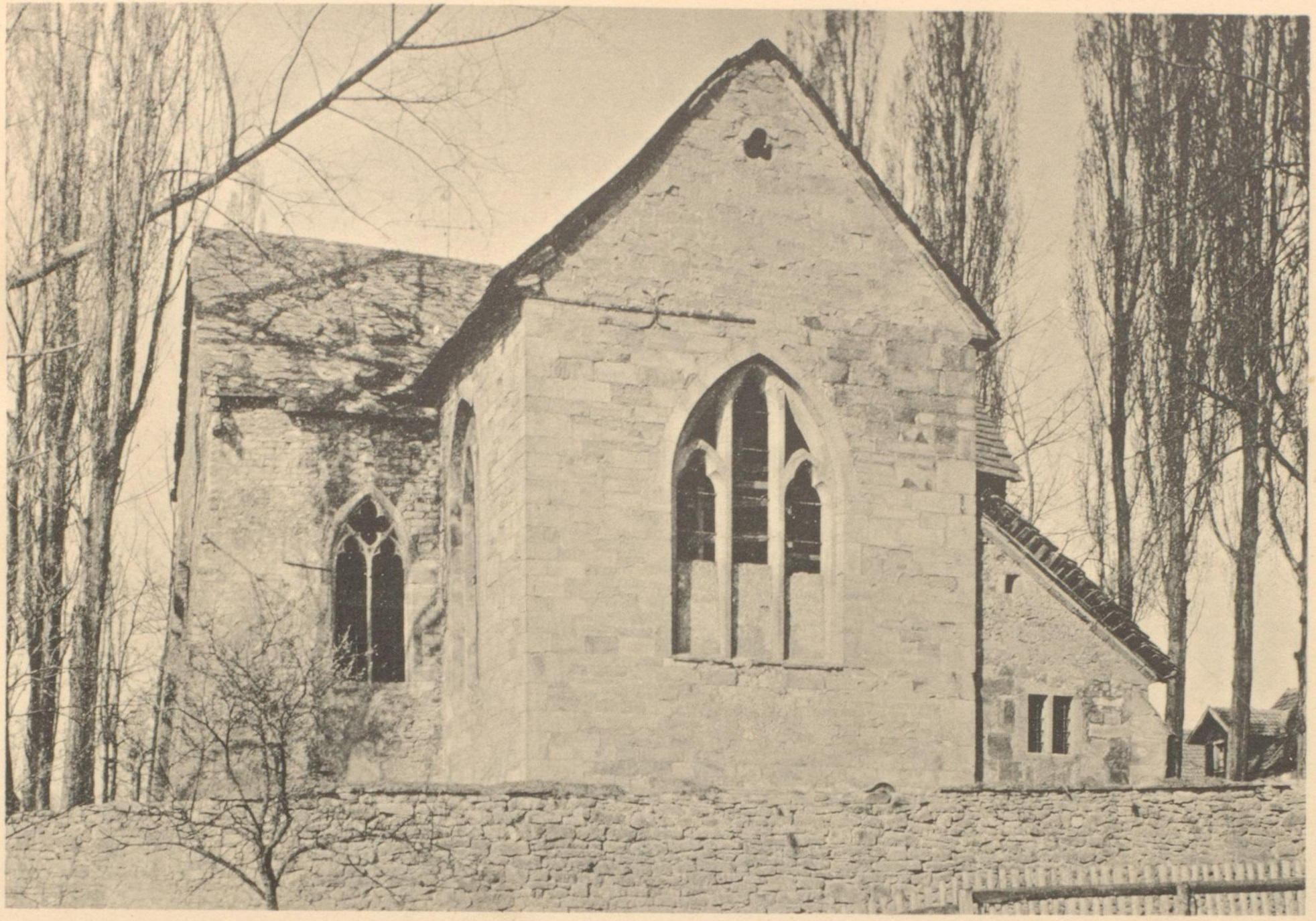 Die Georgskirche in Aplerbeck als verfallene Ruine von der Ostseite im Jahre 1893.